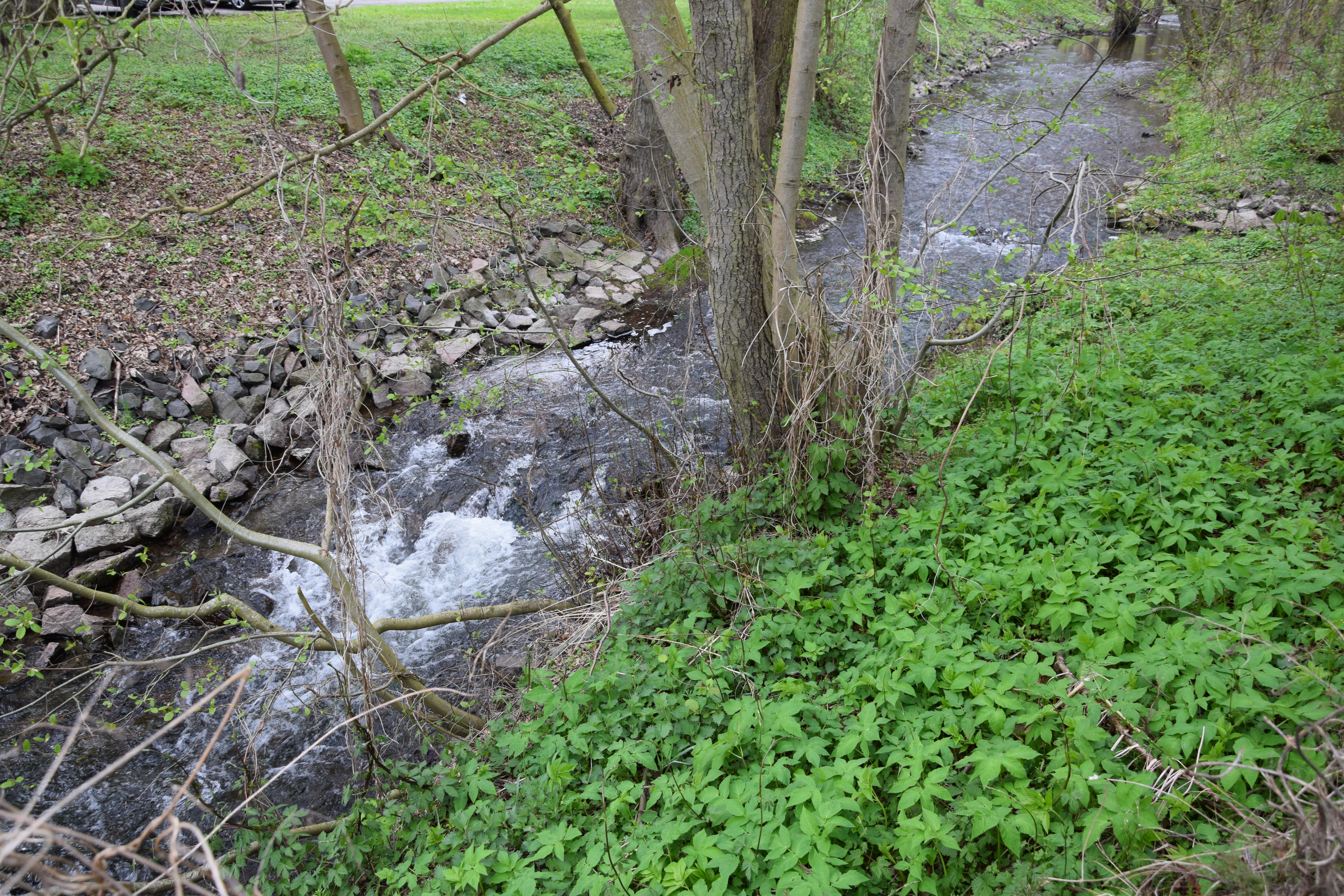 Thyra bei der Heimkehle, die Einmündung der Krummschlacht ist rechts oben.